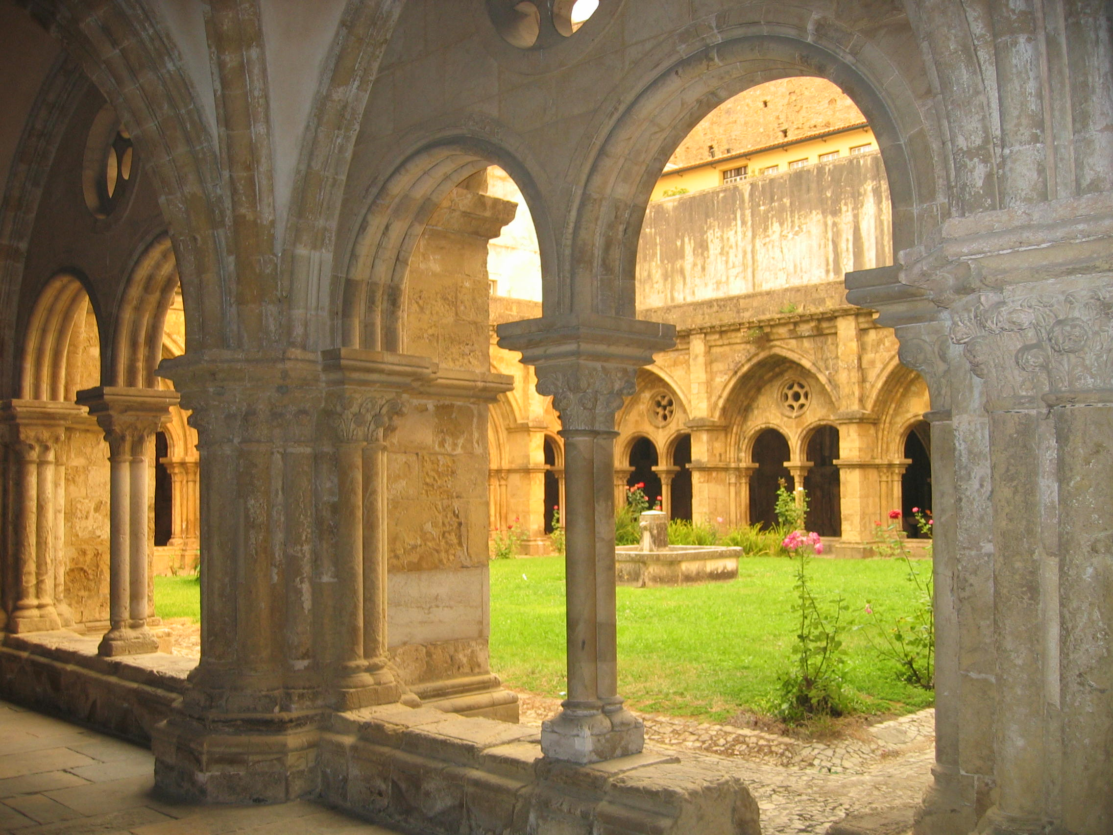 Sé Velha de Coimbra (Cloister) - Portugal Author: Raph Date: 5 August 2005